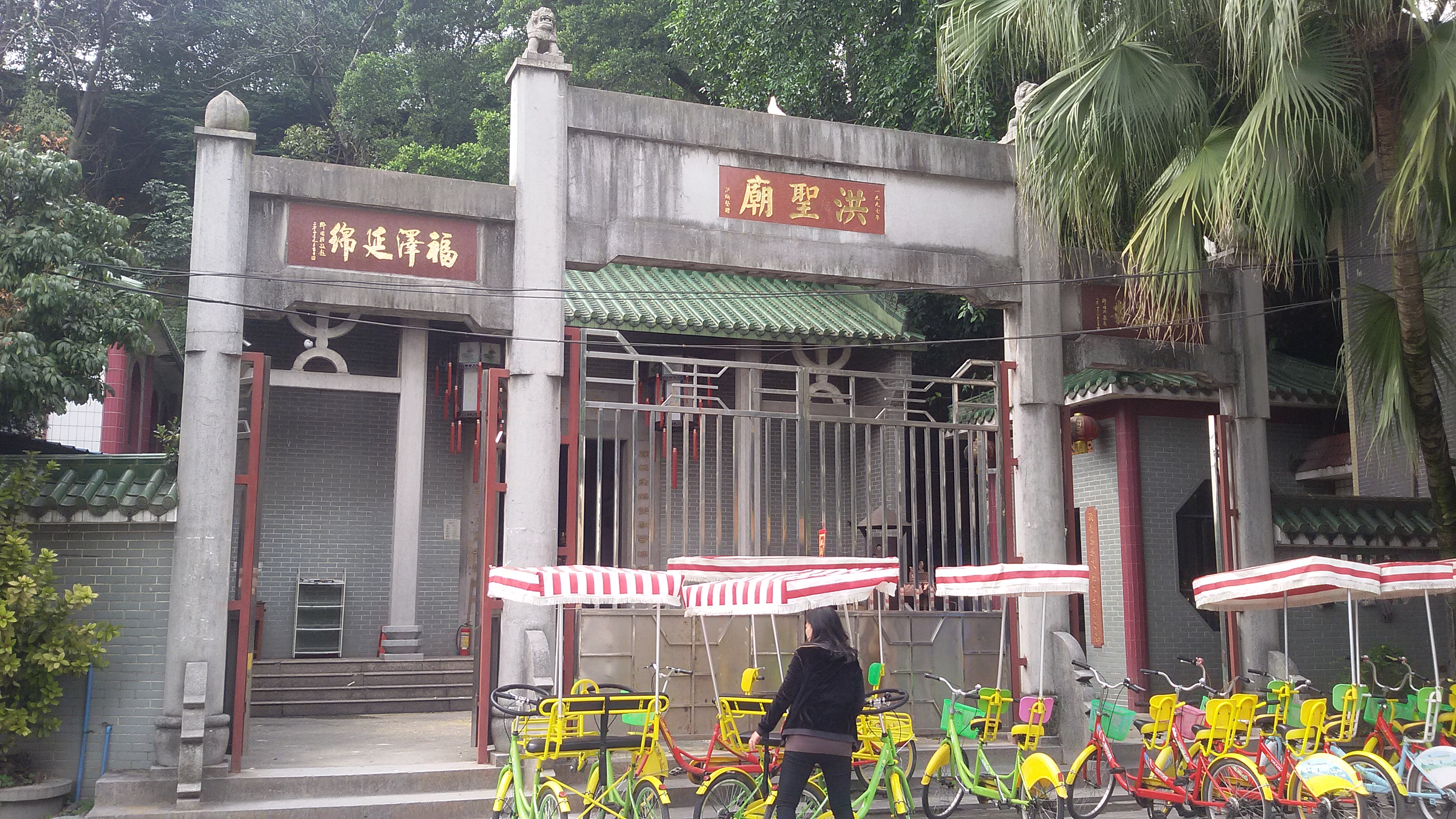 粵語: 下莊洪聖廟